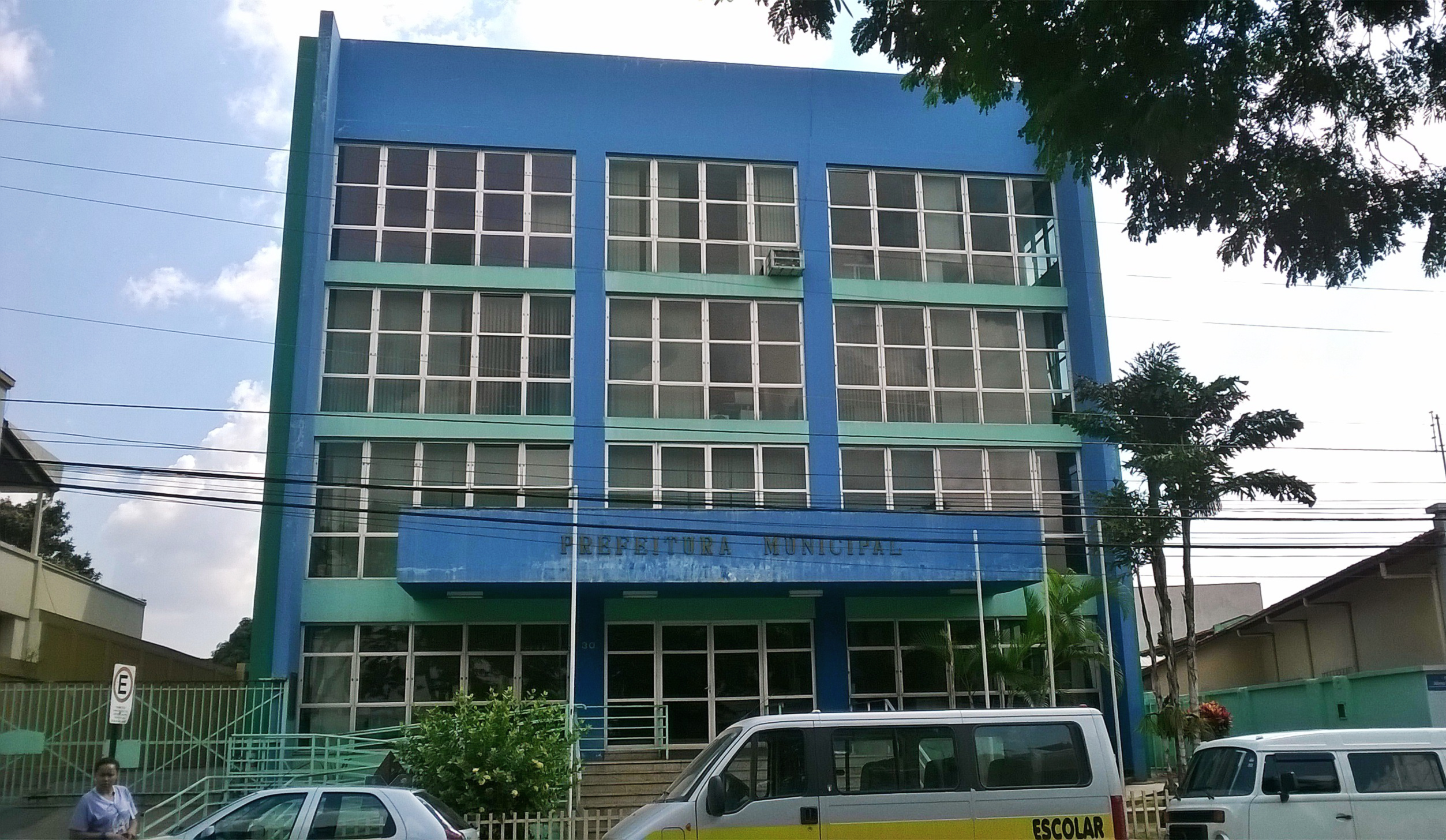 Prefeitura Municipal de Pará de Minas, localizado na cidade de Pará de Minas, Minas Gerais.